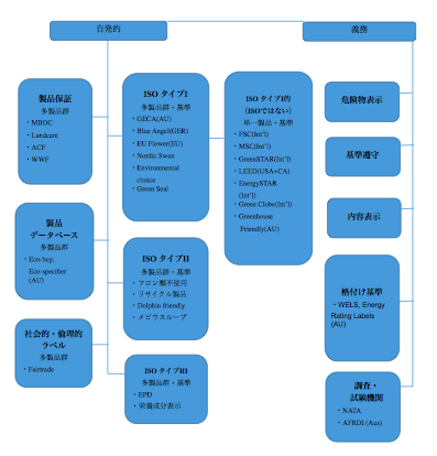 ラベル分類の詳細